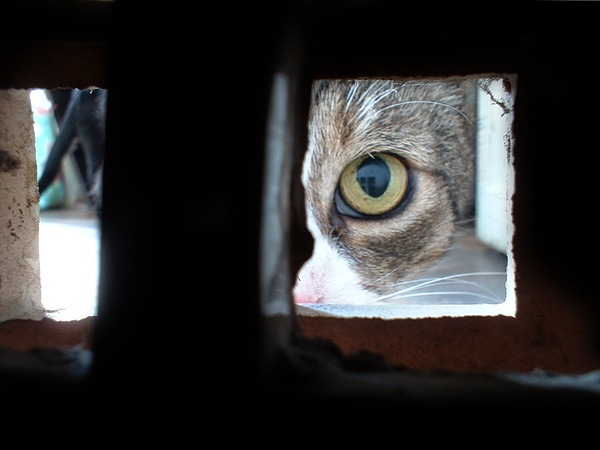 Házi macska vadászat közben, a potenciális zsákmány szemszögéből